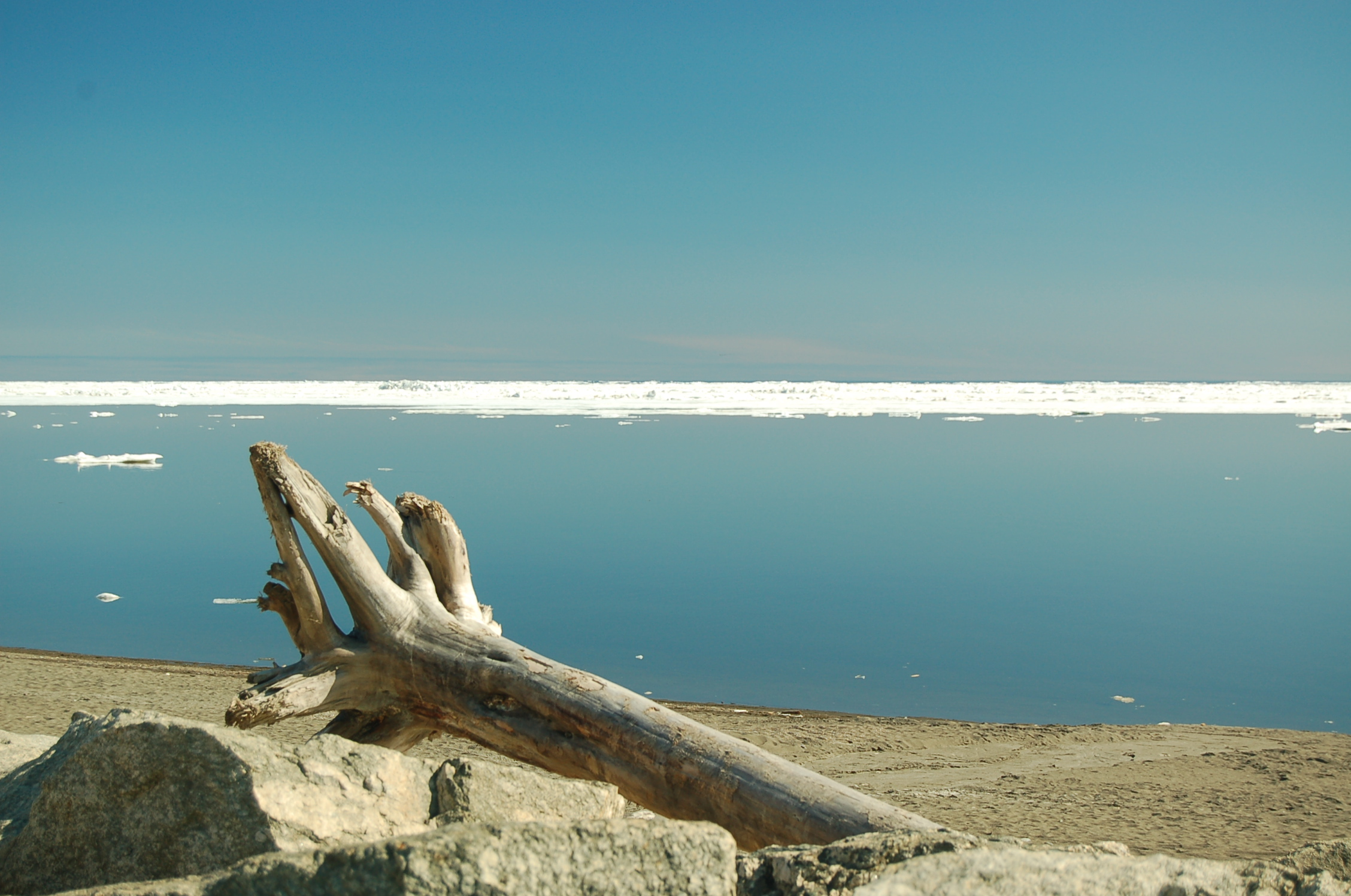 Bering sea at Nome, Alaska